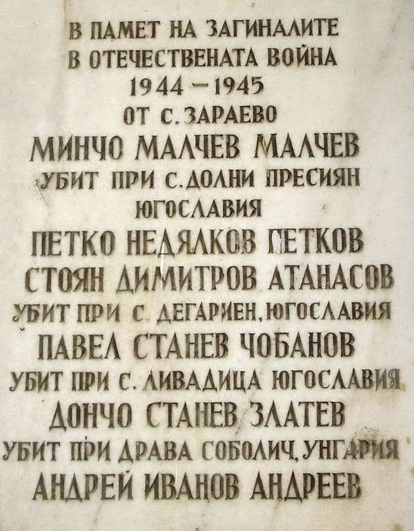 Село Зараево, община Попово. Паметна плоча с имената на загиналите зараевчани през Втората световна война.